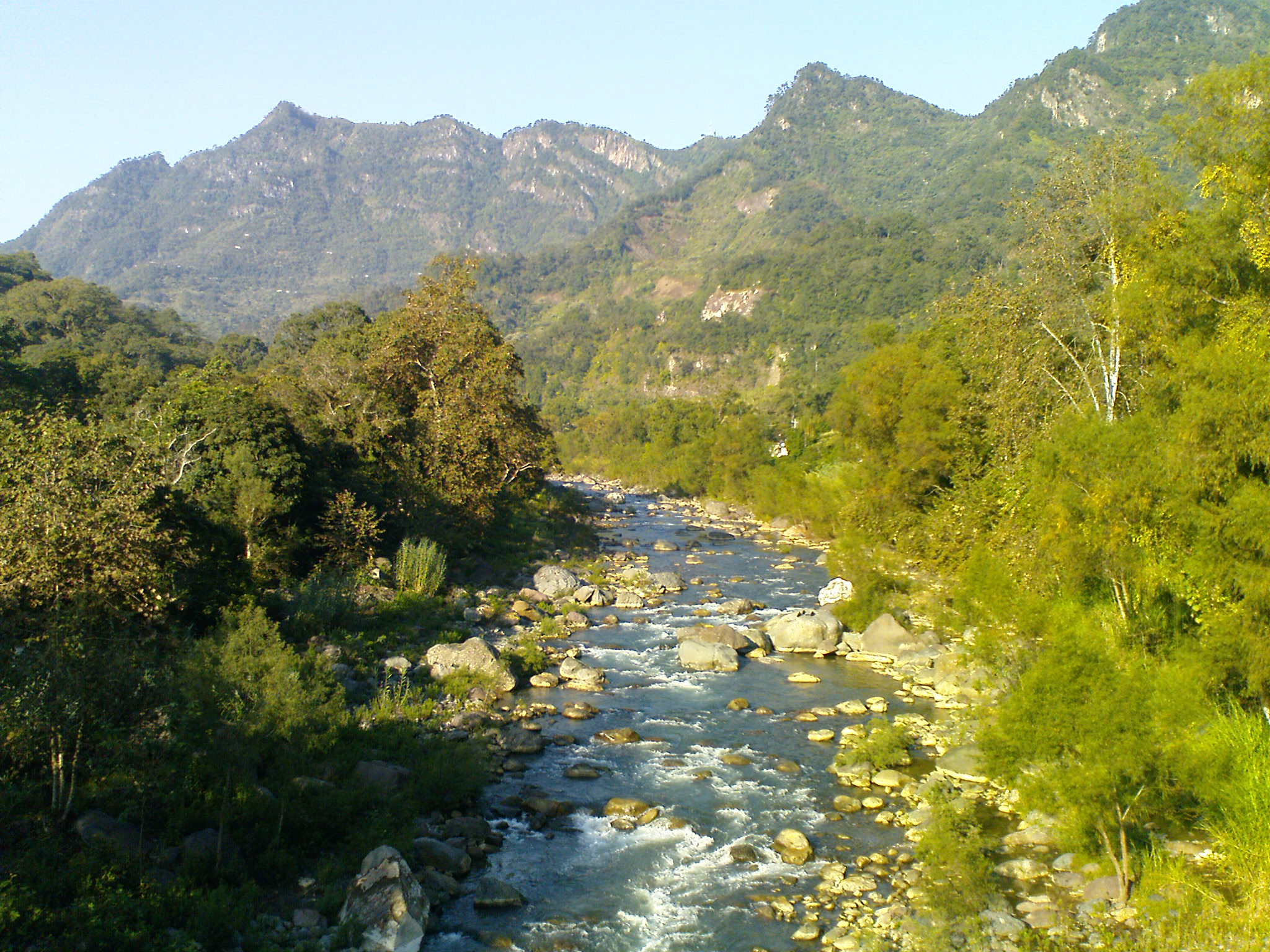 Rio en Zapotitlán